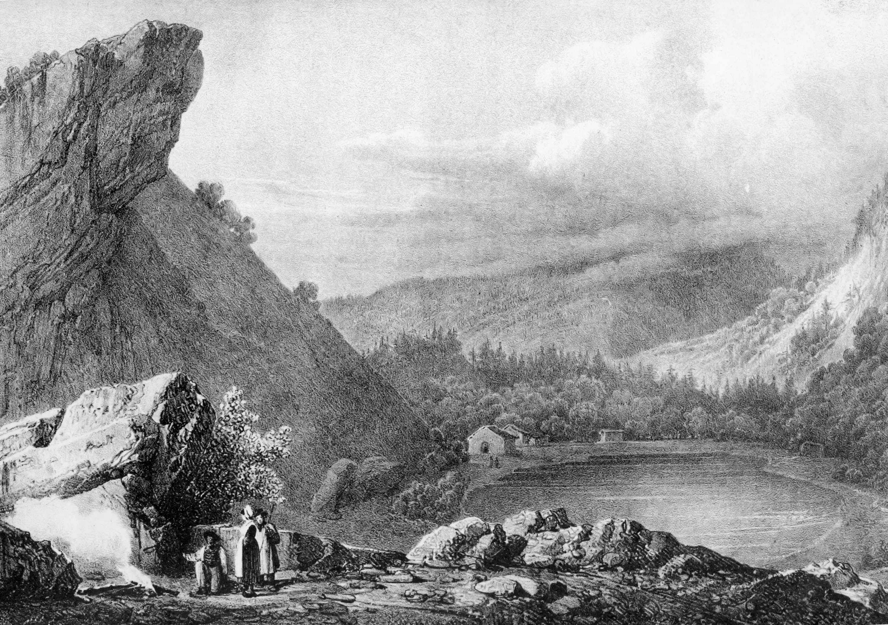 Le lac d'Antre